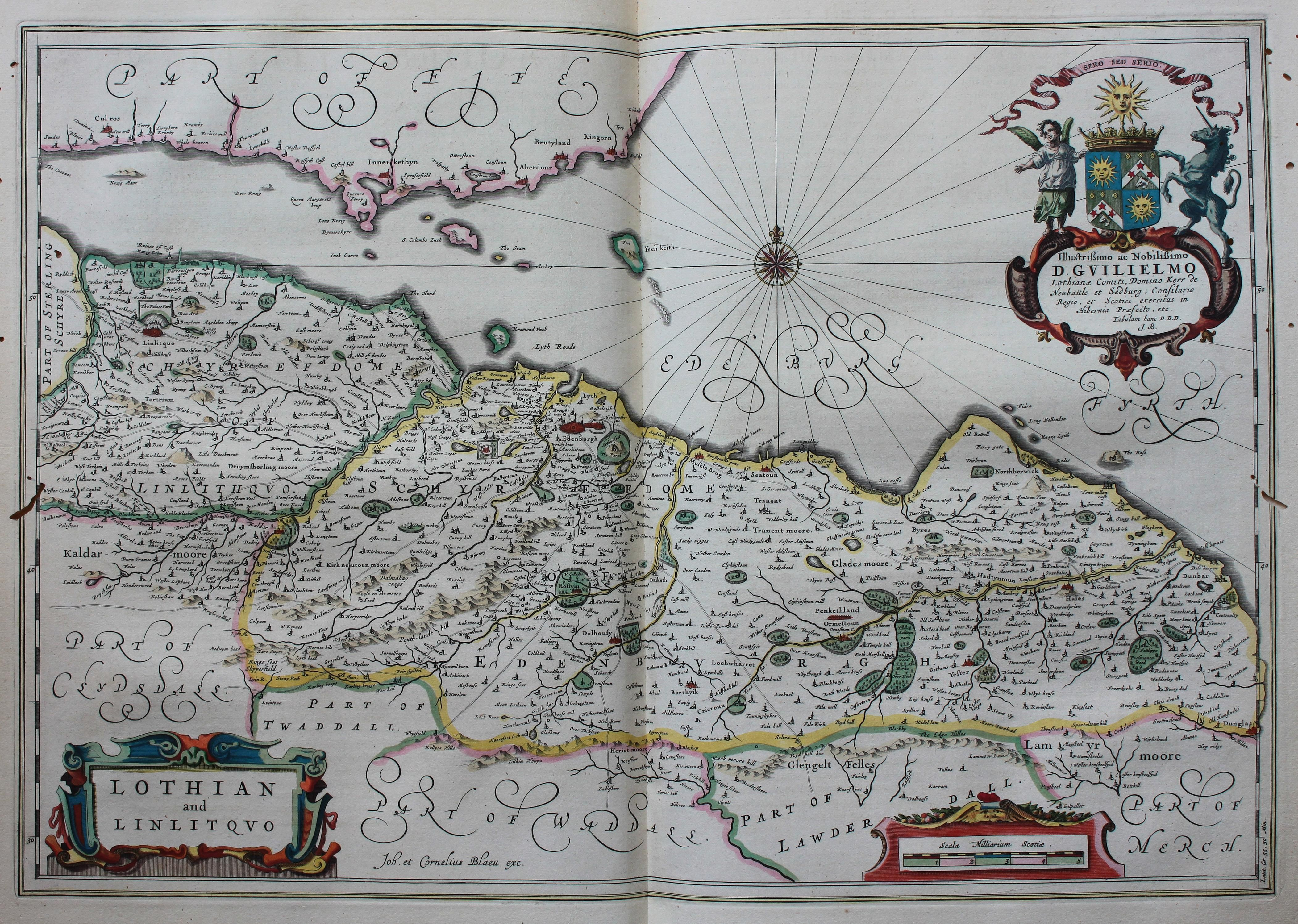 Descripción bibliográfica: Geographia Blaviana. - [Amsterdam : Juan Blaeu, 1659] . - [32], VI, 96 p., 34 f., h. 35a, 35b, 35c, 35d, 36-44 f., 34, [2], 36-40, [2], 43-70 [i. e. 75], [1] f., [20] p. de map., [9] f. de map., [4] f. pleg. de map., [2] f. de plan., [2] f. ge grab. : |bil. ; |cFol. marca major (57 cm.) . - En la dedicatoria a Felipe IV: "Presenta ... El Atlas Universal y Cosmographico de los orbes y terrestre ... Juan Blaeu" . - Título tomado del frontispicio. -- Privilegio fechado en 1659. -Errores de pag. - Sign.: 1, *2, **3, ***-****2, a-e2, A-I2, K1, L-Z2, Aa-Dd2, 4 2, Ee-Ff2, A-I2, K1, L2, M1, N-Y2, Z5, Aa-Dd2, Ee1, A-D2, E-F1, G-I2, K-L1, M-O2, P1, Q-Z2, Aa-Bb2, Cc1, Dd3, Ff-Zz2, Aaa-Bbb2, . - Frontispicio grab. col. -- Incluye un total de 49 il. entre map., plan. i grab. Materia: Atlas - Obras anteriores a 1800 Impresor: Blaeu, Joan, 1596-1673, imp. Lugar de impresión: Holanda. Amsterdam Localización: Vea la ilustración en su contexto Visite también la exposición "Cartografía histórica en la Biblioteca de la Universidad de Sevilla"